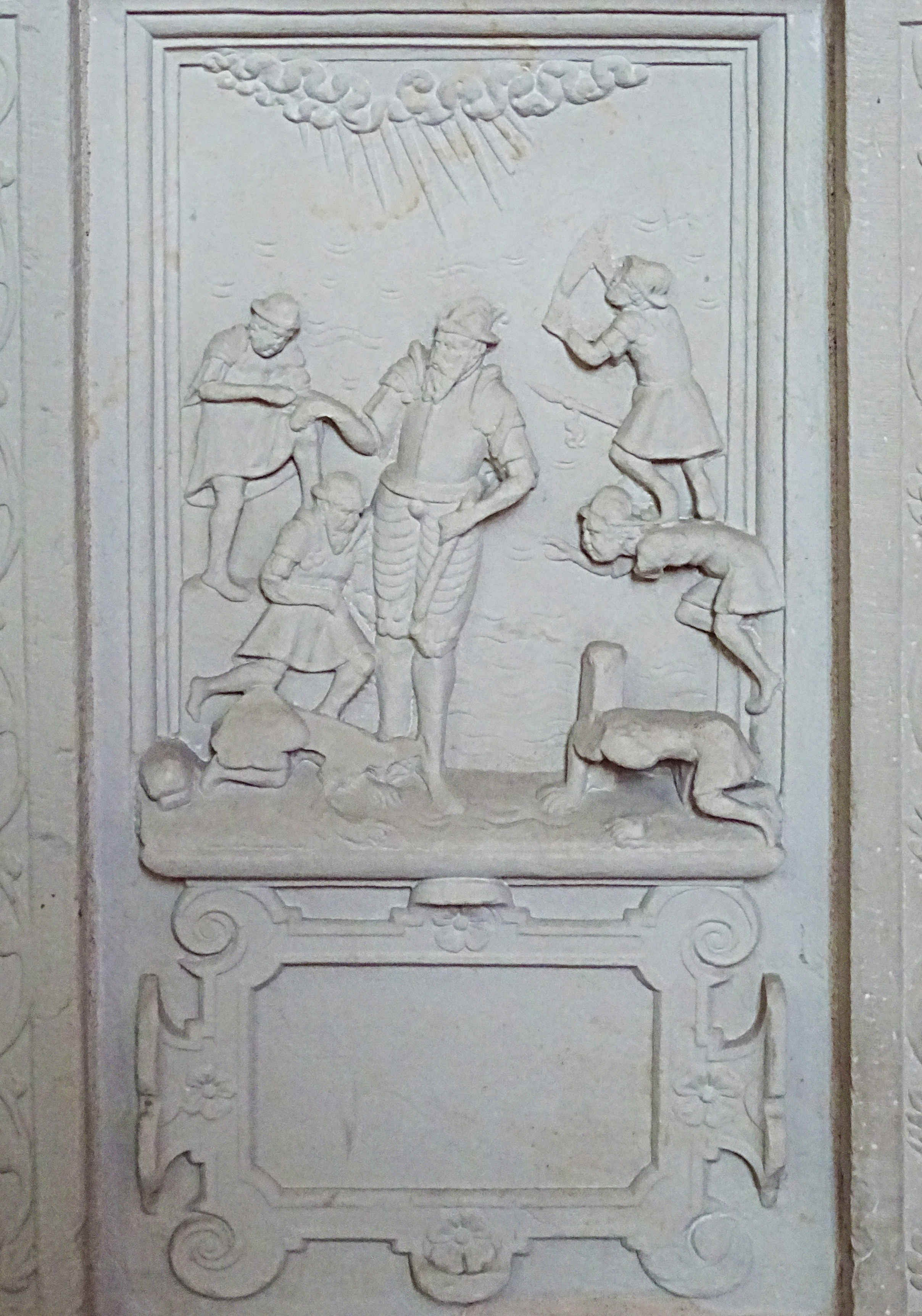 Steinbilderbibel in der St. Annenkirche (Eisleben), 22/29, Gideon wählt Männer für den Krieg gegen die Midianiter aus